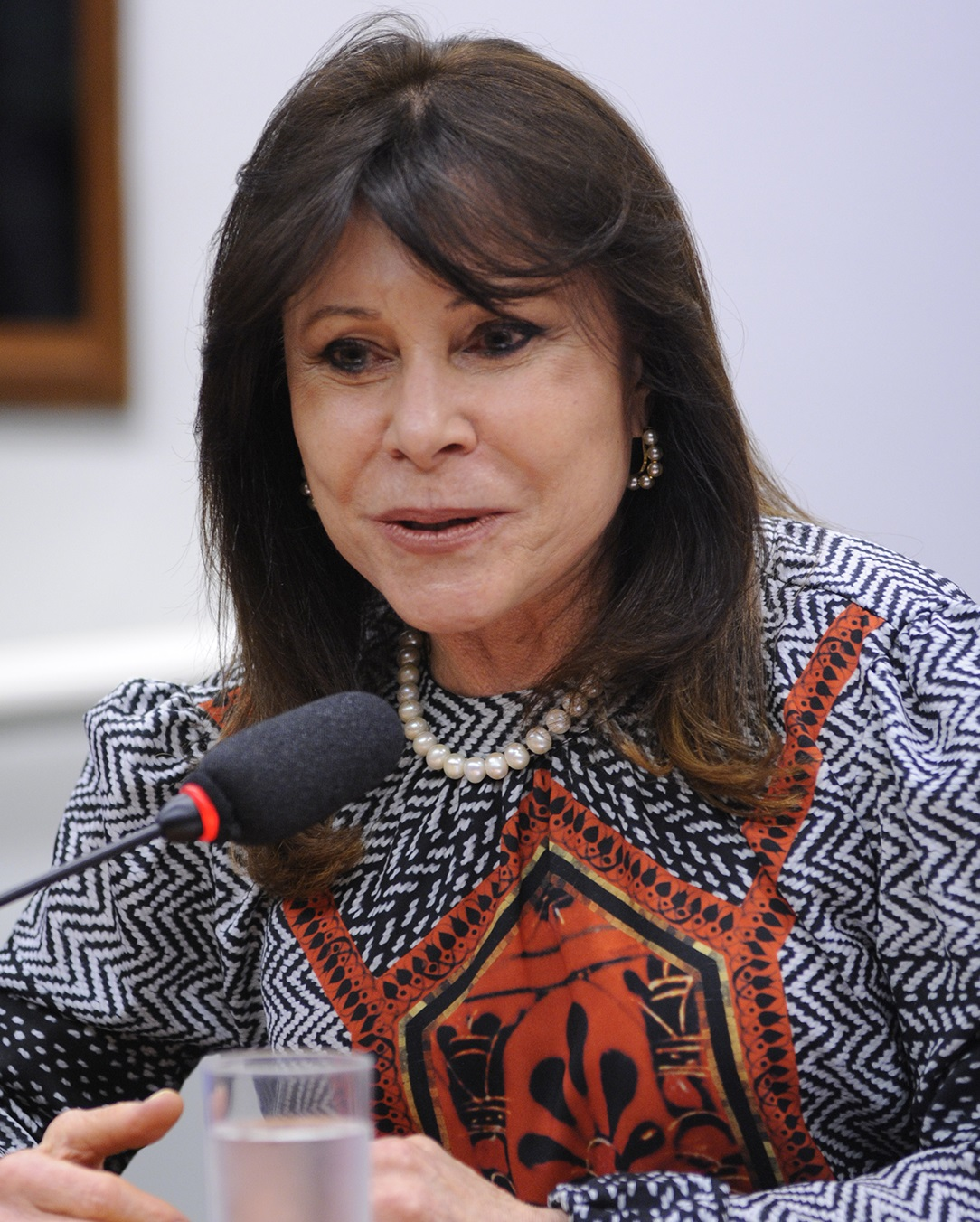 Maria Helena em setembro de 2016.